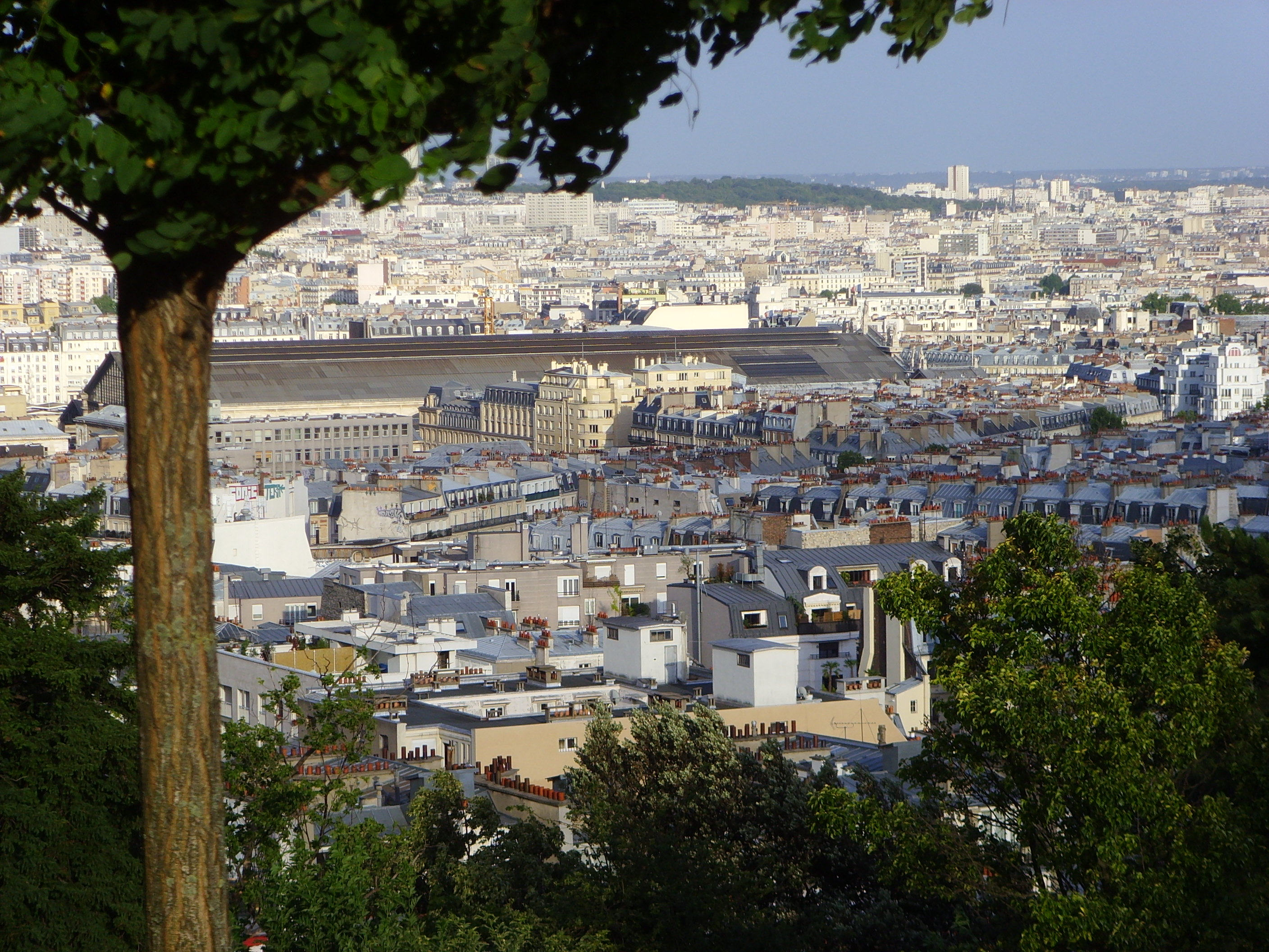 View from the Basilique du Sacré-Cœur de Montmartre